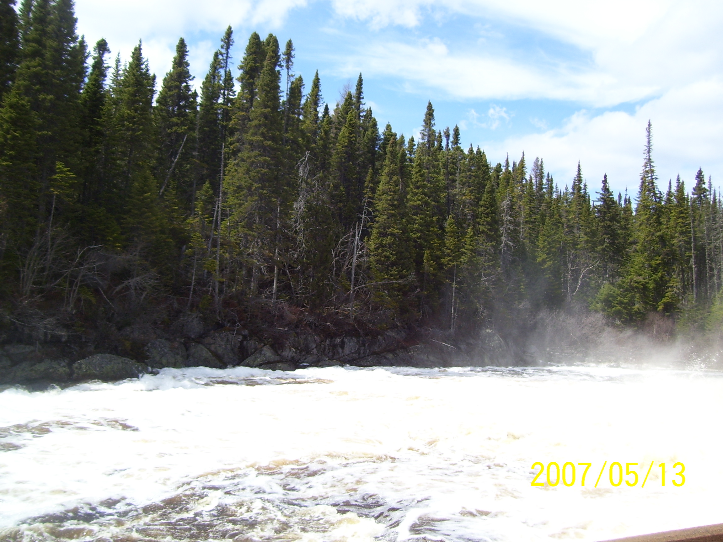 riviere_matamek